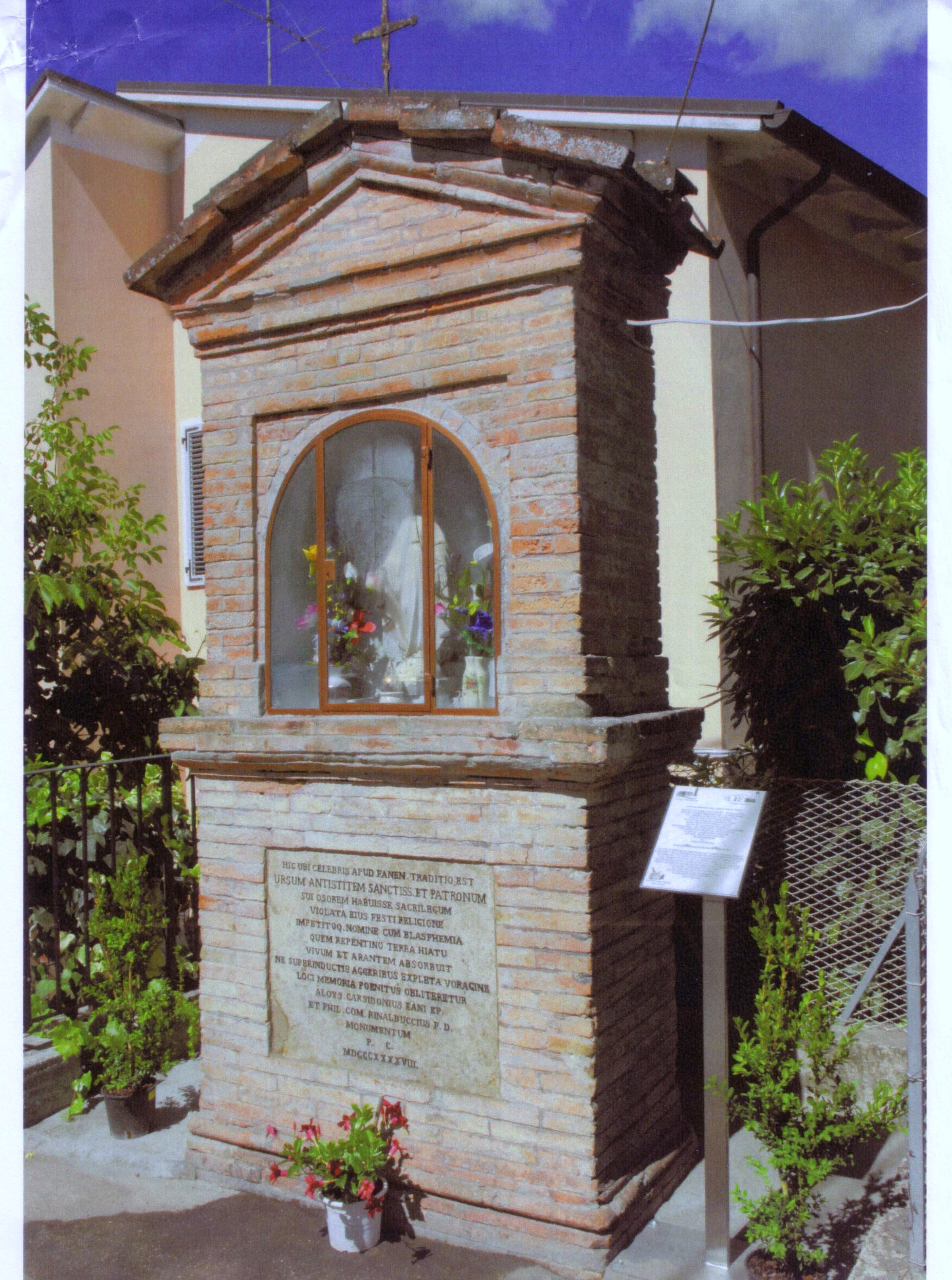 Edicola con una Madonnina edificata a Fano, nel quartiere di S. Orso nel 1848.